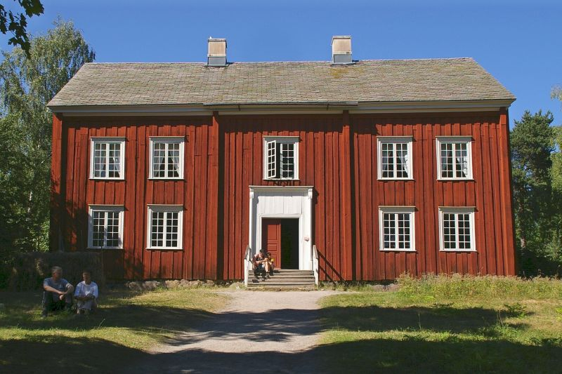 Ekhäradsgården, Skansen.